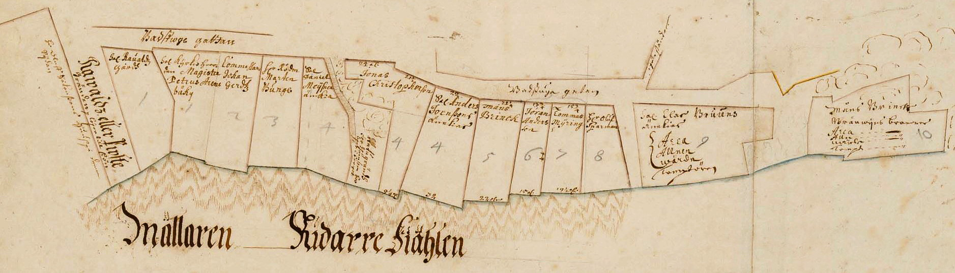 Kvarteret Lappskon enligt Holms tomtbok, norr är nedåt